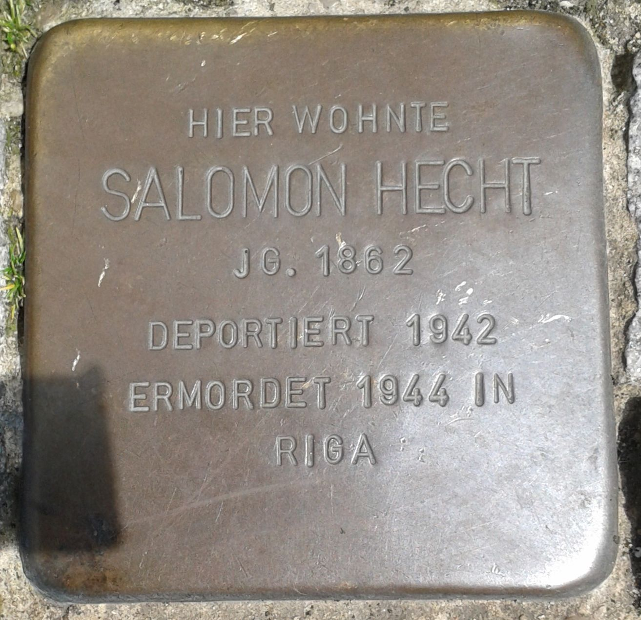 Stolperstein Datteln Tigg 9 Salomon Hecht